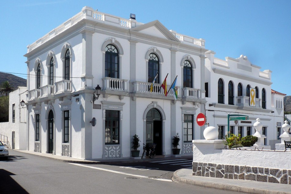 Rathaus der Gemeinde Haría auf Lanzarote